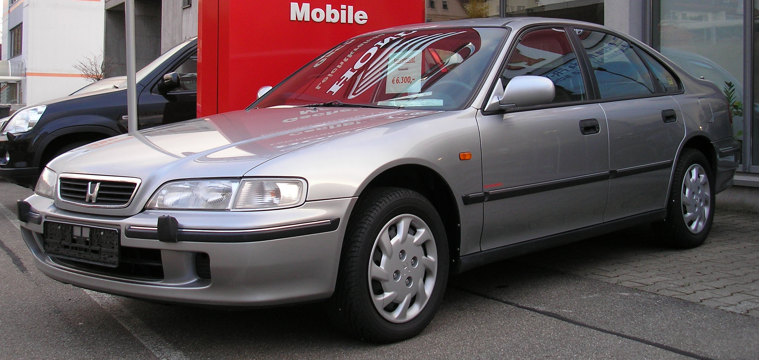 Honda Accord Euro version, ca. 1996-98